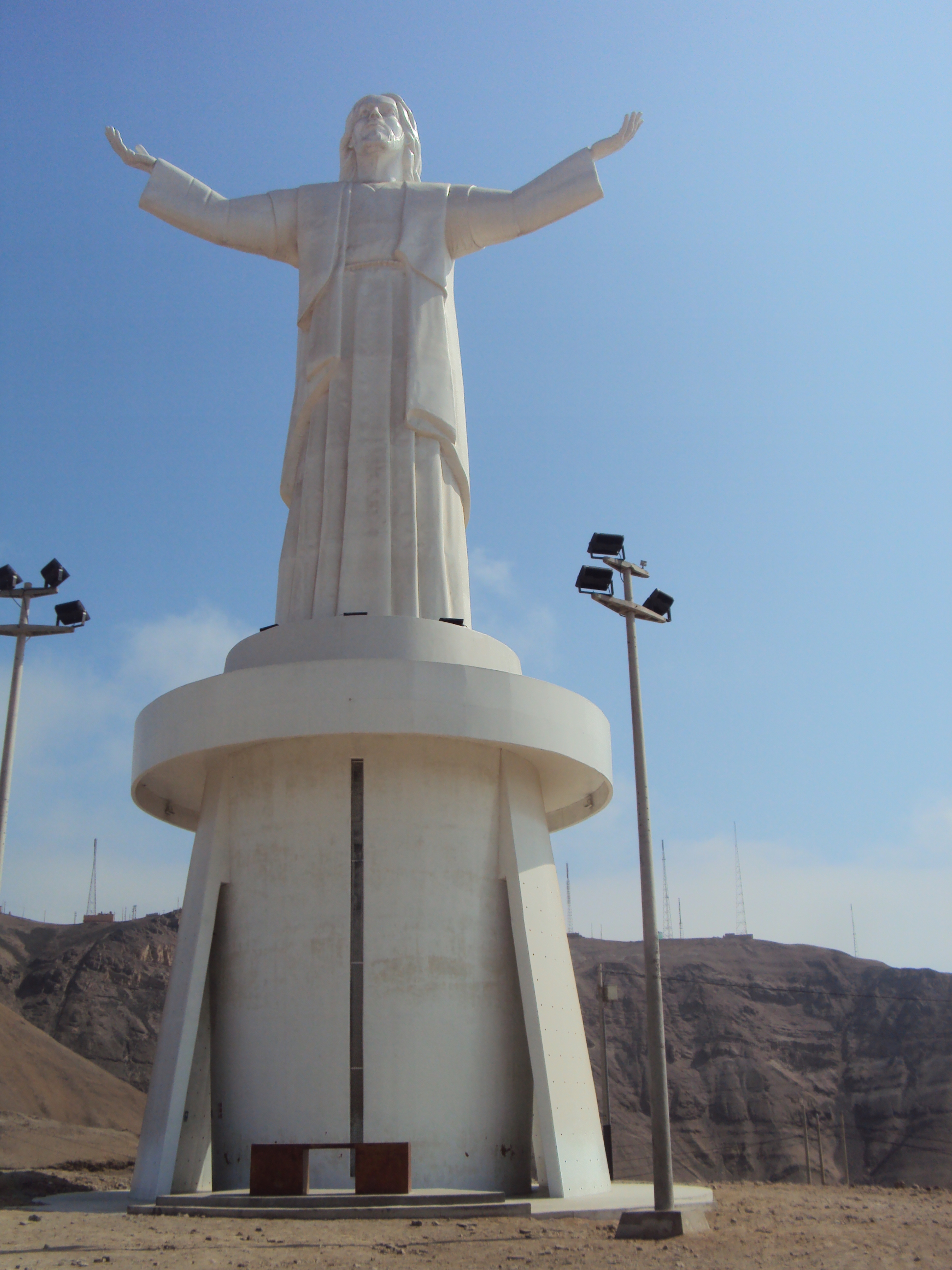 Cristo del Pacífico en su pedestal